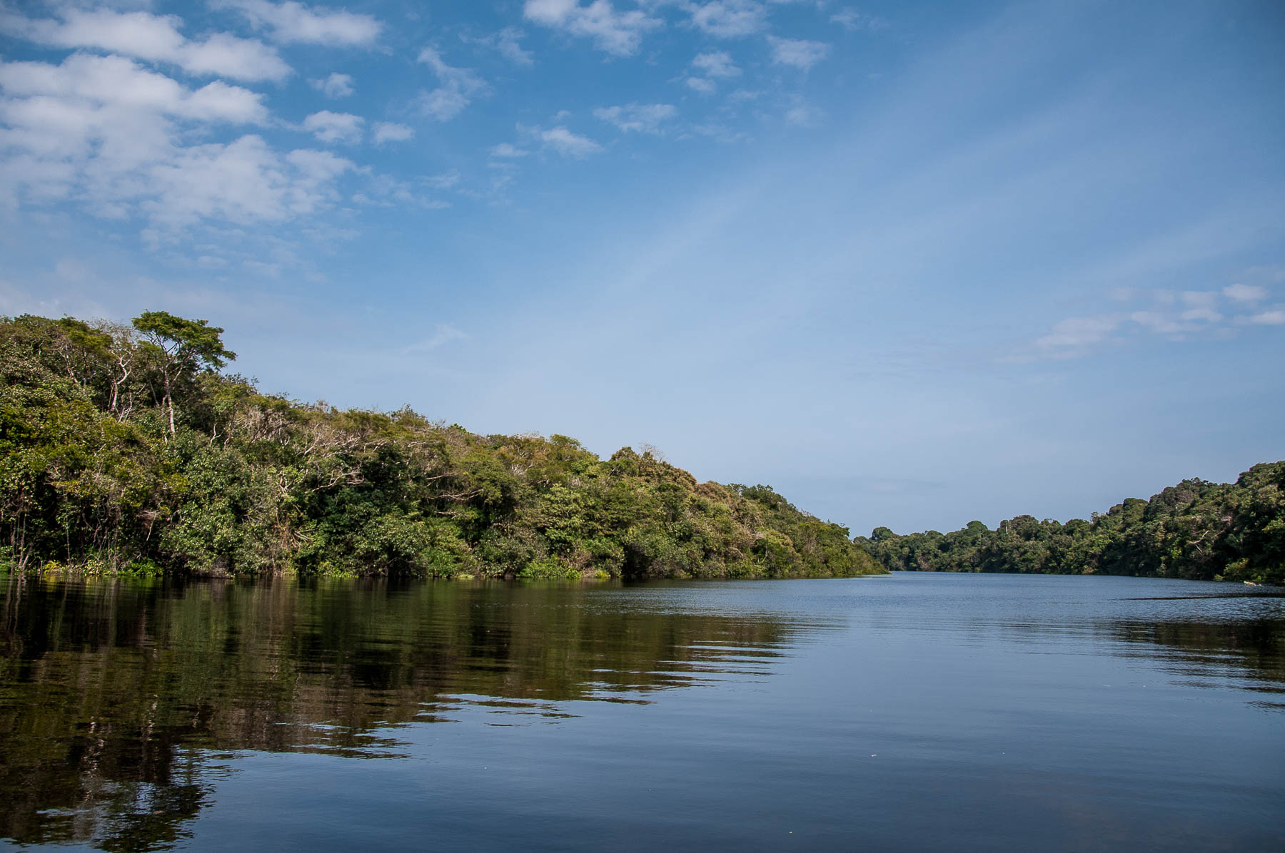 O Parque Nacional de Anavilhanas foi criado com o objetivo de preservar o arquipélago fluvial de Anavilhanas bem como suas diversas formações florestais, além de estimular a produção de conhecimento por meio da pesquisa científica e valorizar a conservação do bioma Amazônia com base em ações de educação ambiental e turismo sustentável. O foco é harmonizar as relações entre as comunidades do entorno e a Unidade com ações de bases sustentáveis. O parque abrande os municípios de Novo Airão e Manaus (AM). A Unidade de Conservação apresenta formações diversas como Floresta Densa com cobertura uniforme, Floresta Ombrófila Densa, Campinarana Arbórea (terra firme), vegetação Caatinga-gapó e chavascal, além de ecossistemas fluviais e lacustres.